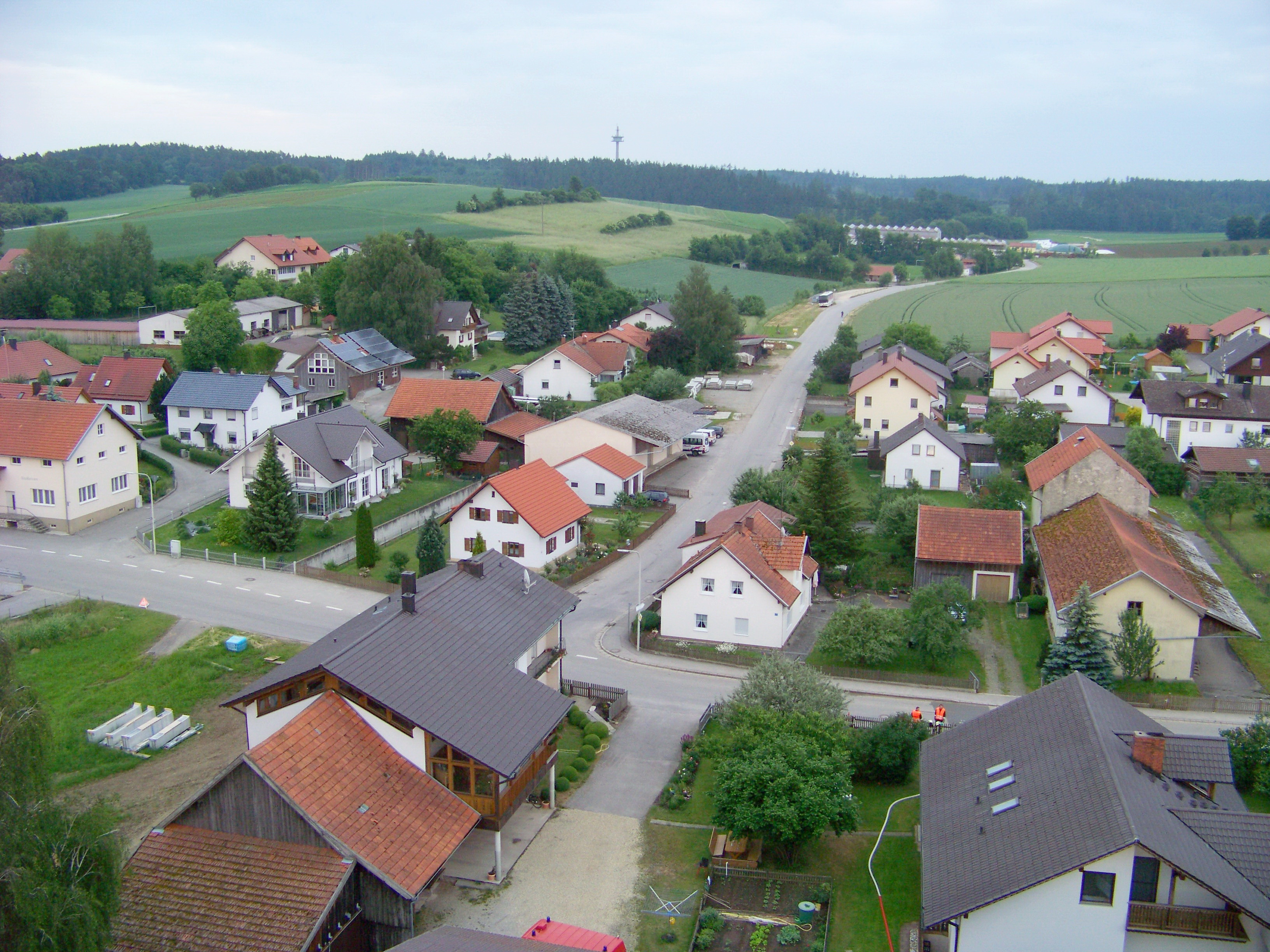 Laberweinting, Hofkirchen. Blick über Hofkirchen nach Osten zu den Wäldern am Poschenhof. Über den Baumgipfeln ist der 103 Meter hohe Fernmeldeturm der Telekom AG vom Typ FMT 12 zu sehen. Er wurde 1979 errichtet.